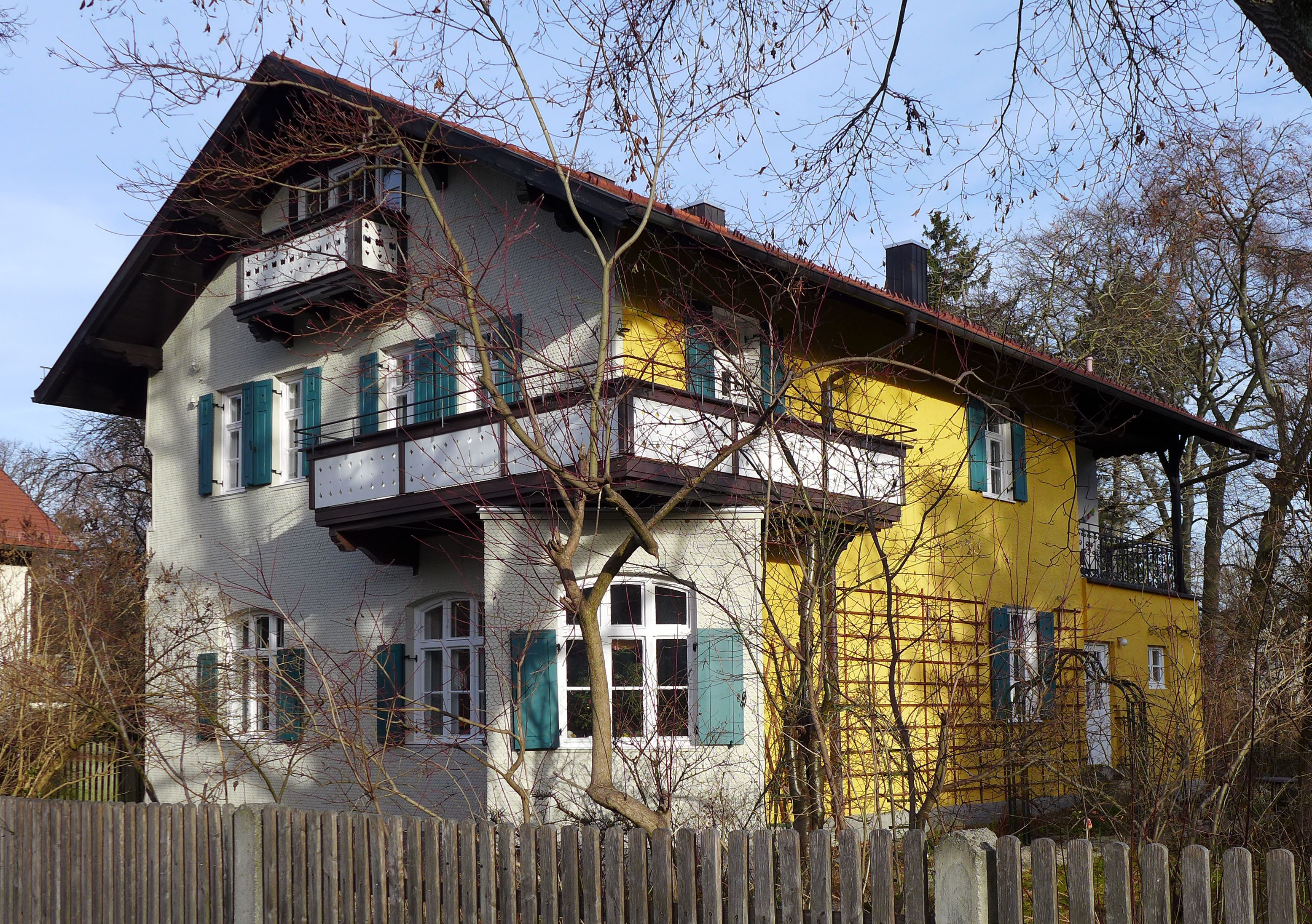 Oselstr. 28, München